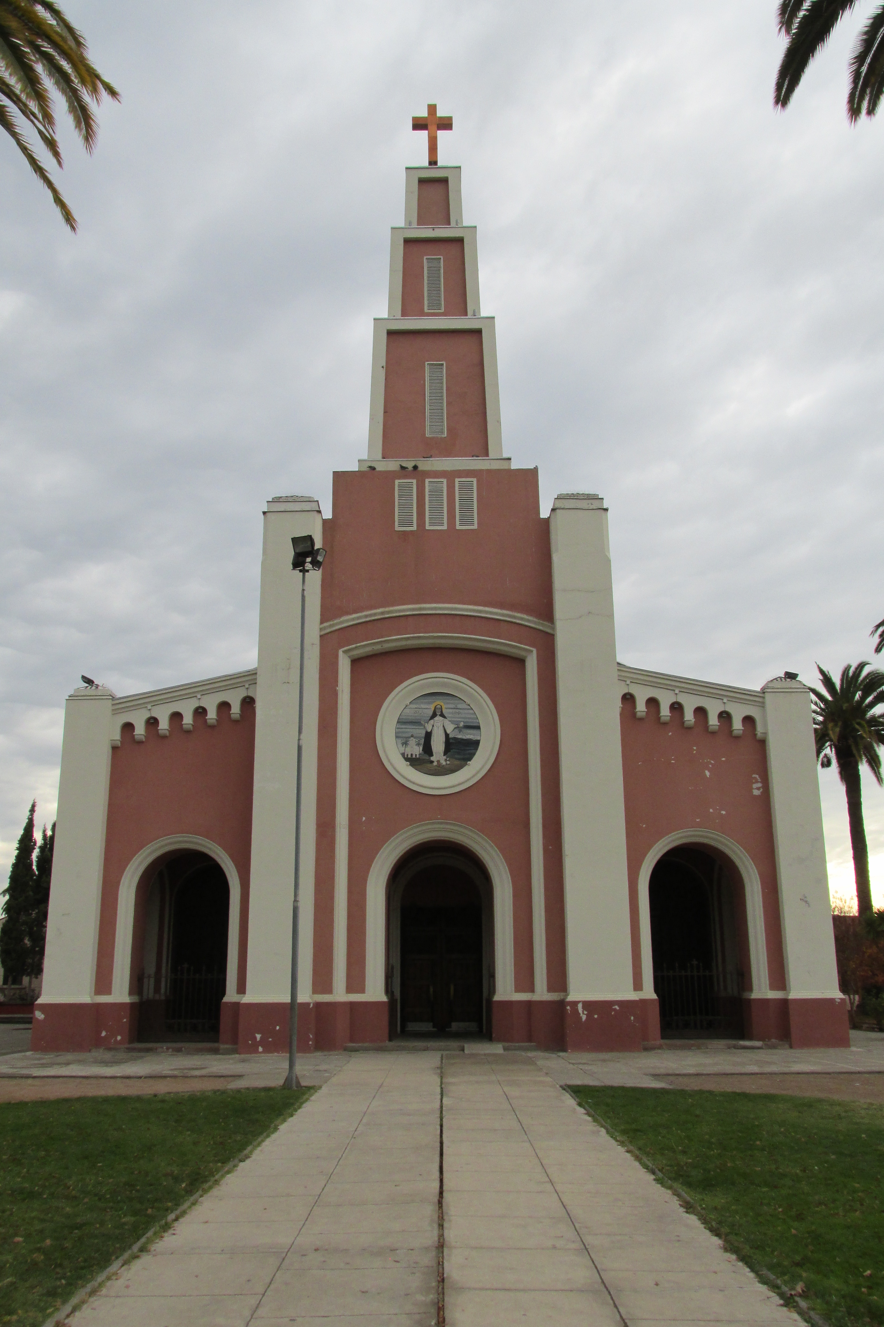 Frontis Iglesia Santa Rosa de Pelequén